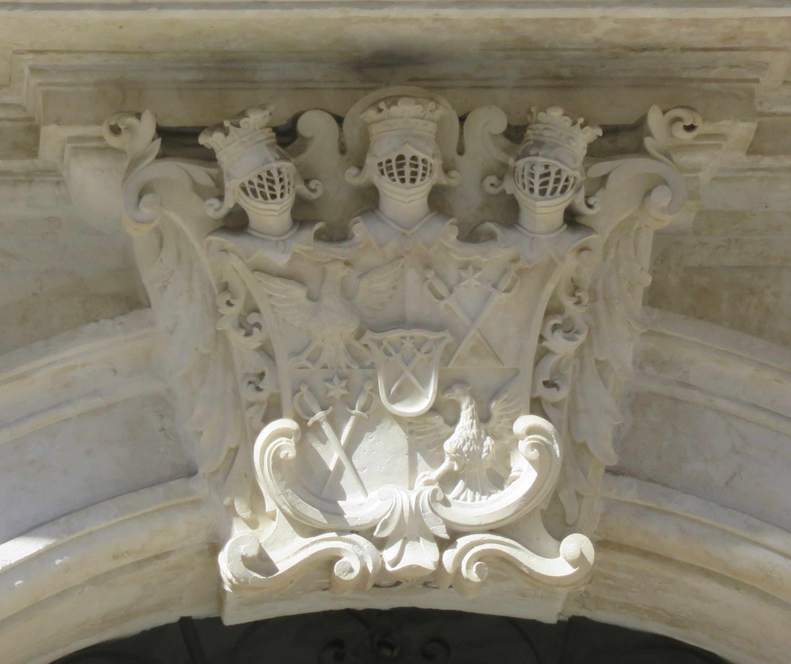 stemma araldico